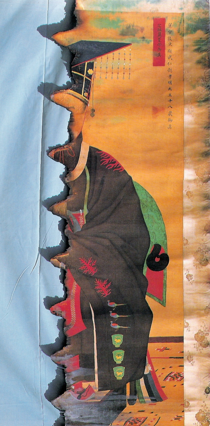 孝明世子の御真。半焼